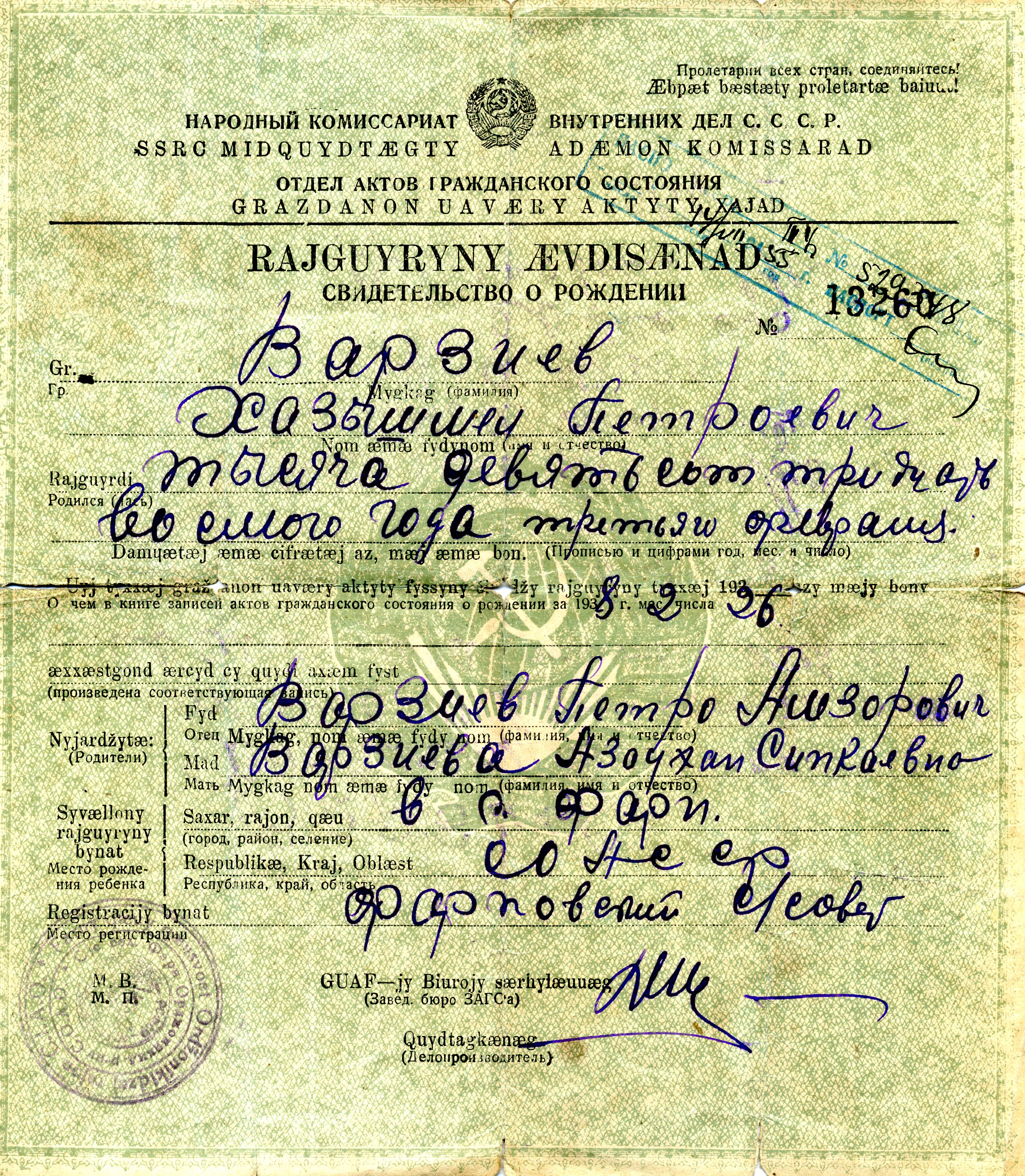 Х.П.Варзиев - видетельство о рождении